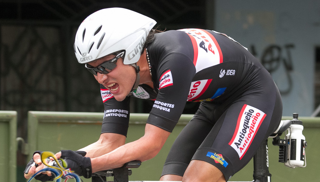 Campeonato Nacional de Ruta 2013 Contrarreloj Individual 35 Km 2 vueltas Chicoral - Espinal - Chicoral